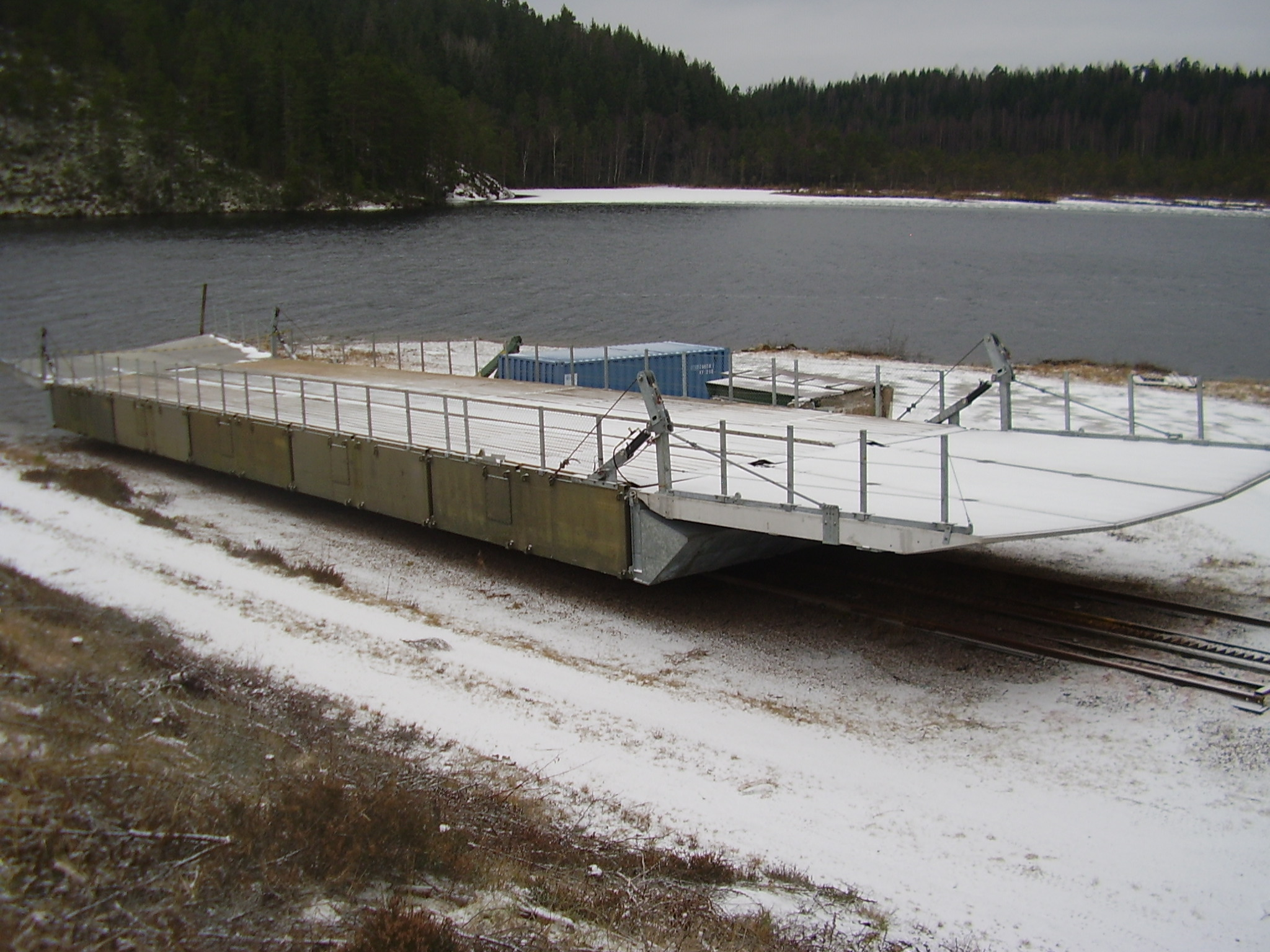 Pontonfärja som ska användas under april-maj 2009 på Sund-Jarenleden i Dalsland.